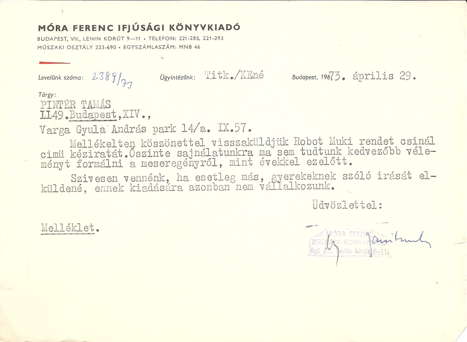 Pintér Tamás Robot Muki című meseregényének kiadói visszautasítása, 1973